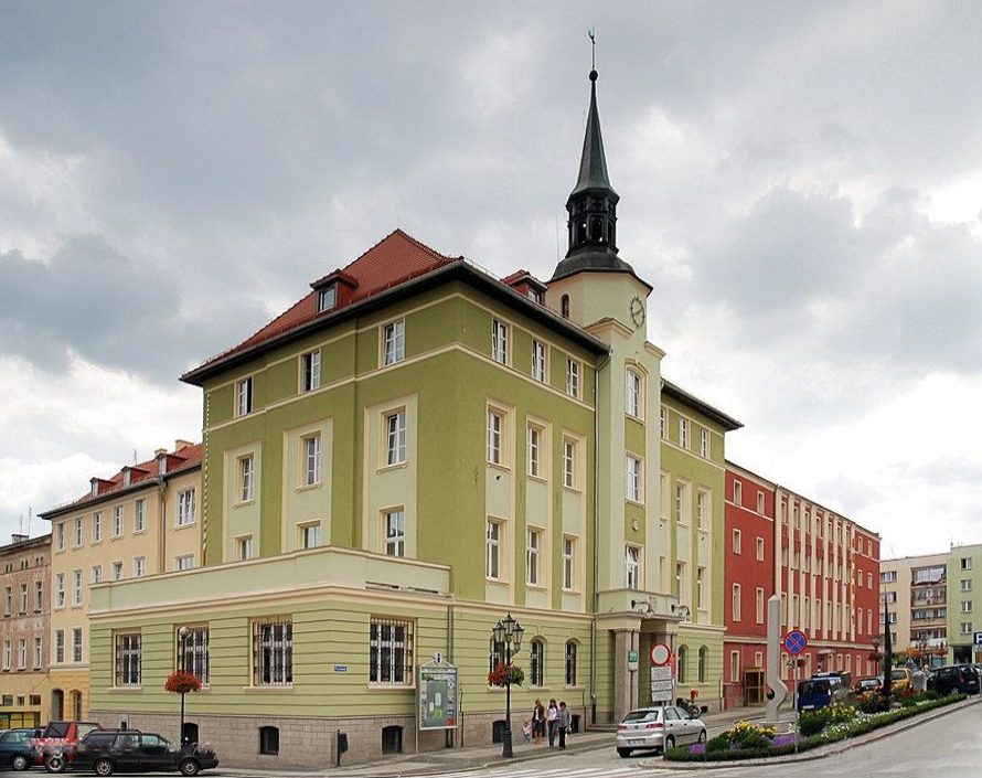 Nowy ratusz w Strzelinie